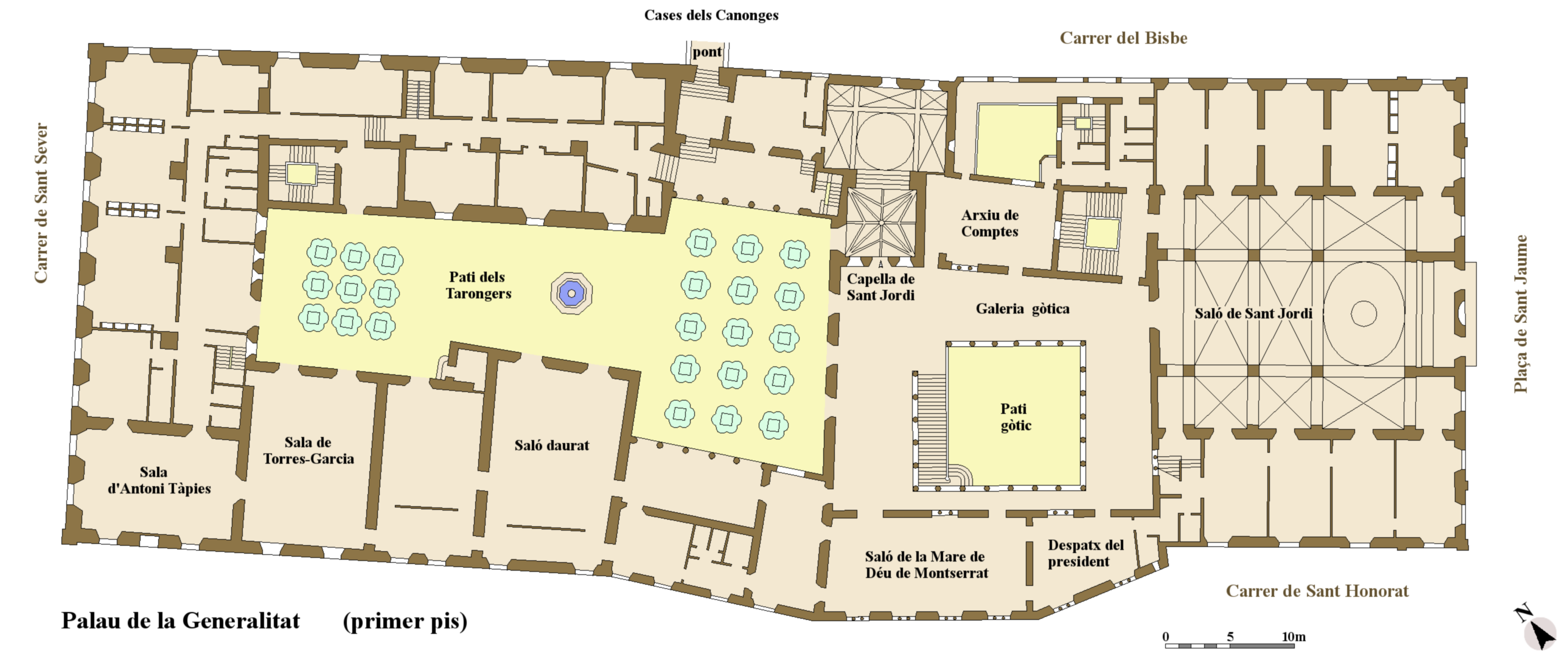 Cròquis del Palau de la Generalitat de Catalunya